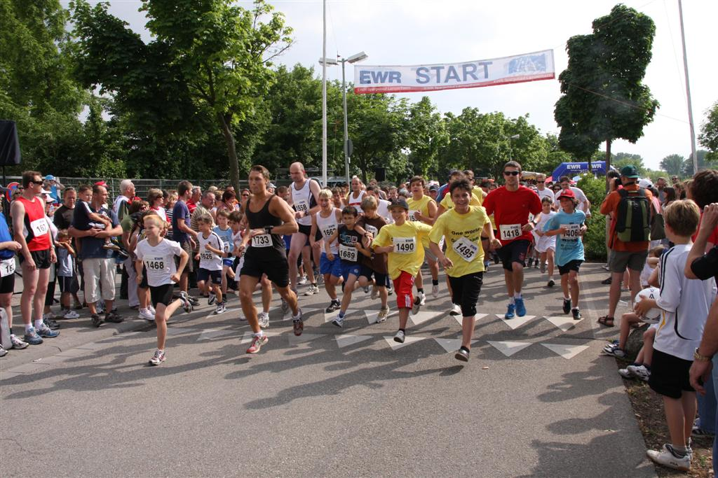 Spargellauf Lampertheim 2008 Start 5km